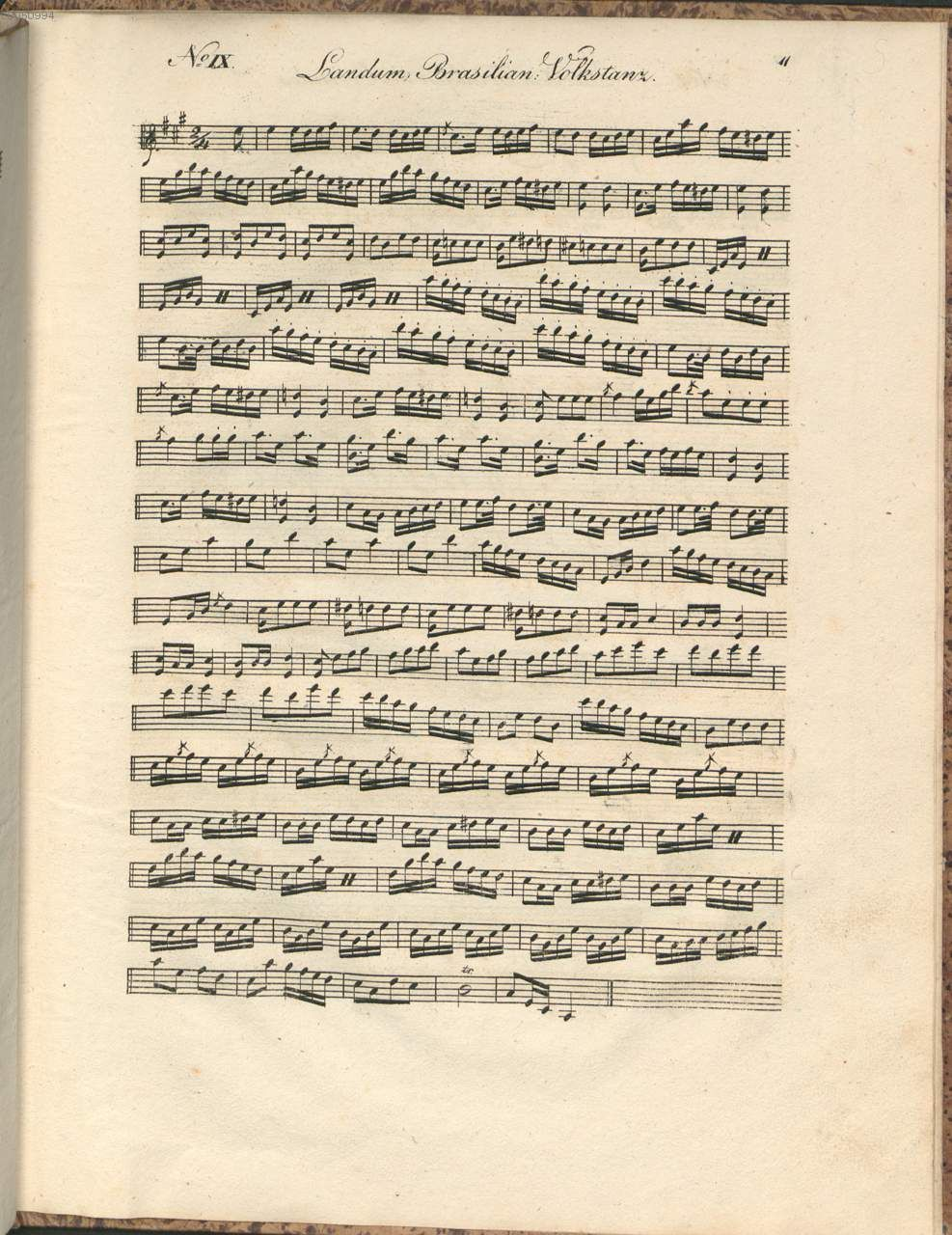 Lundu recolhido por Von Martius em sua viagem ao Brasil entre 1817 e 1820. Publicado no anexo musical do livro "Viagem pelo Brasil", de Spix e Martius, "Brasilianische Volkslieder und indianische Melodien, " (Cantigas Populares Brasileiras e indígenas), com o título "Nº IX Landum, Brazilian. Volkstanz" (Landum, Dança Popular Brasileira).